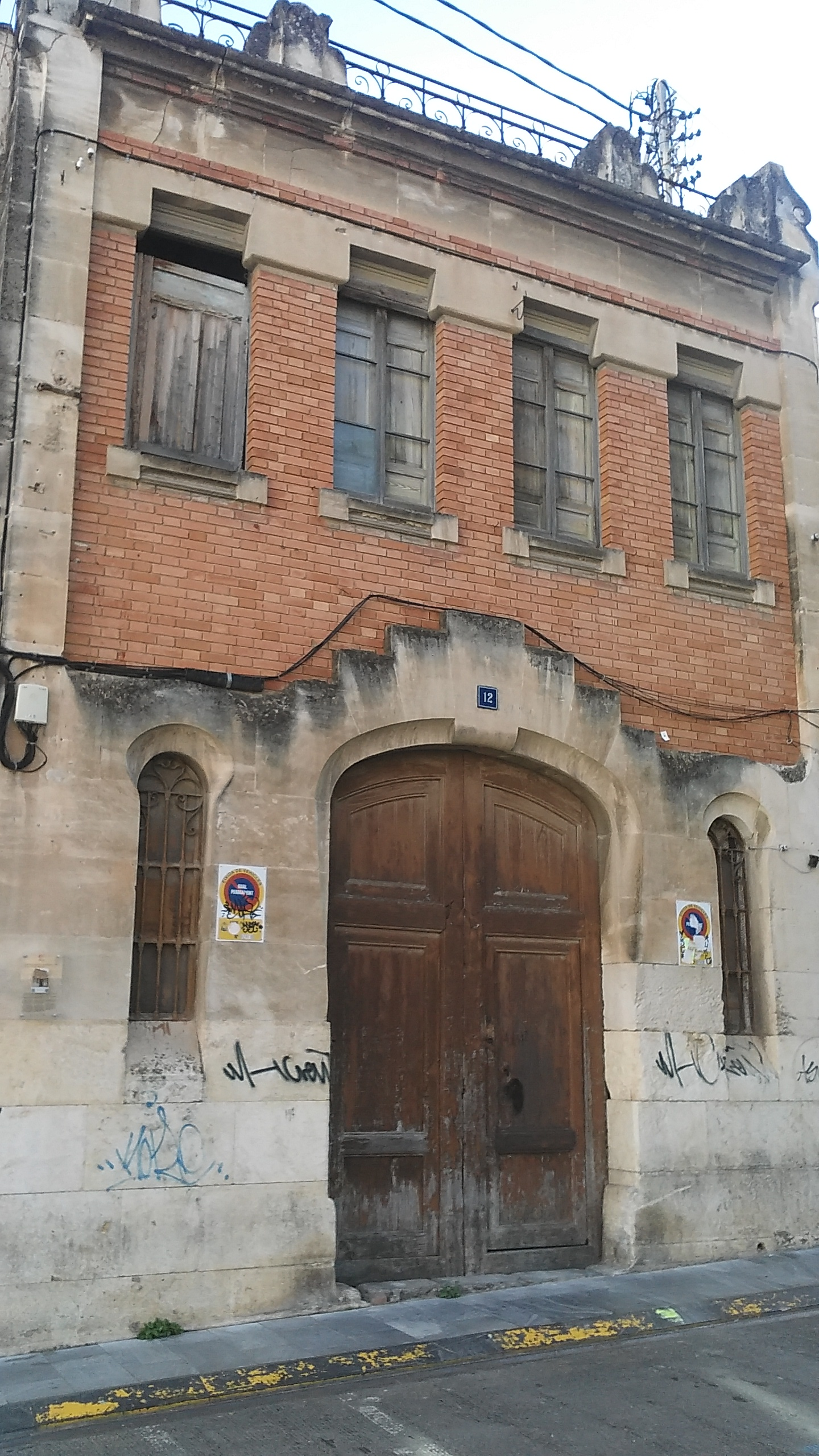 Cocheres d'estil moderniste en la plaça Emili Sala número 12 d'Alcoy (Alacant). Obra de l'arquitecte Timoteo Briet Montaud.